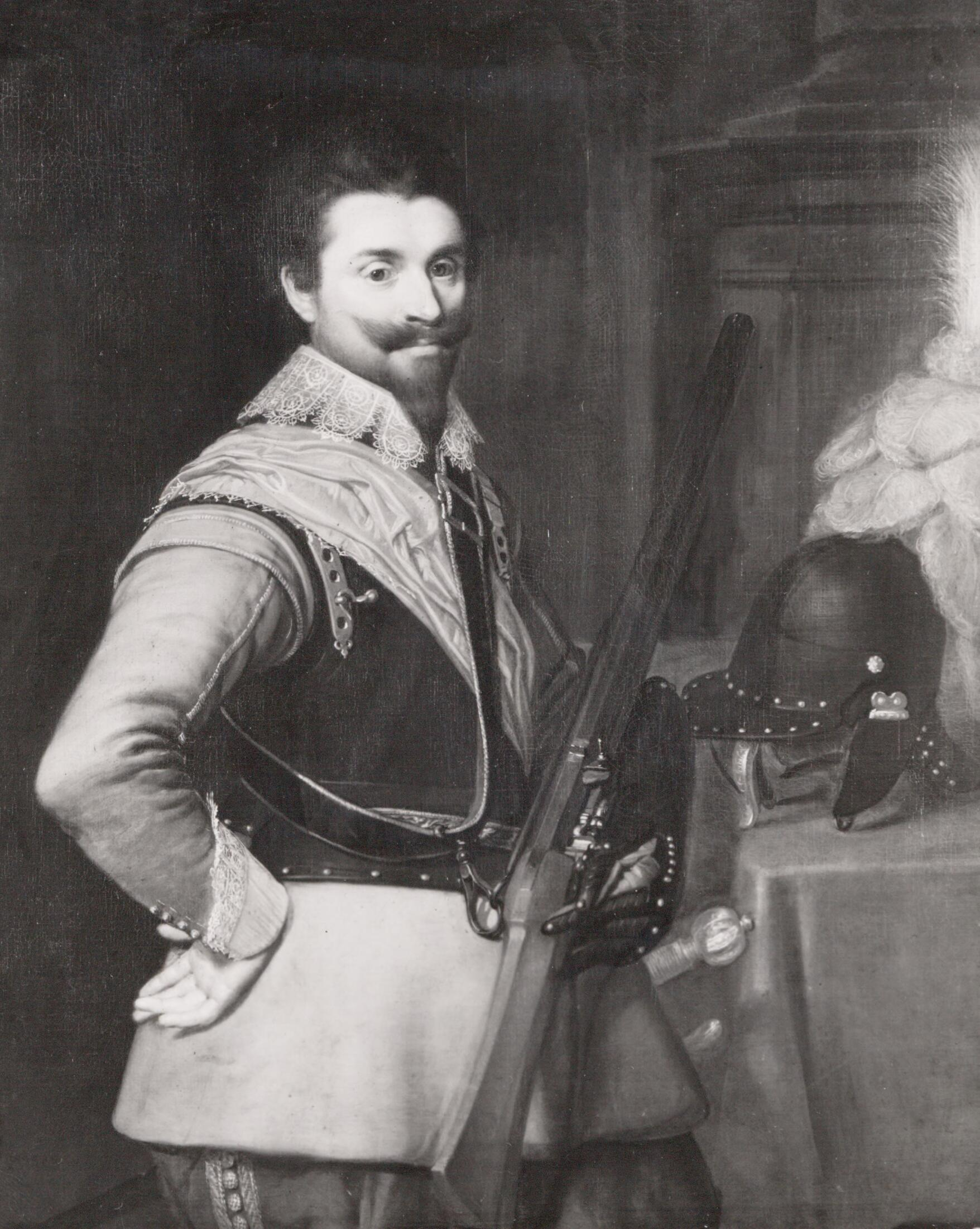 Herman Otto van Limburg Stirum (1592-1644)